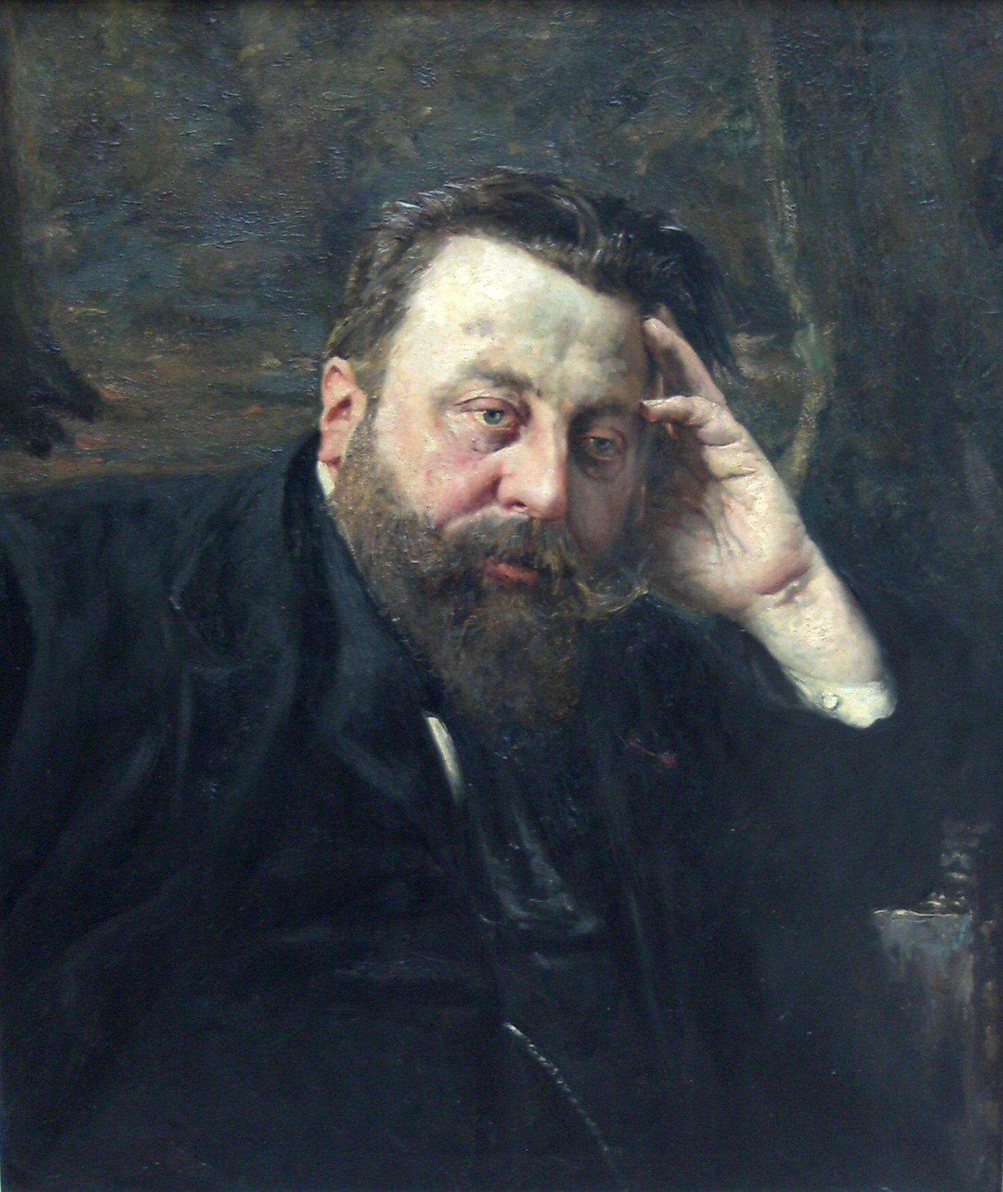 Zelfportret Jan Frans Sinmons